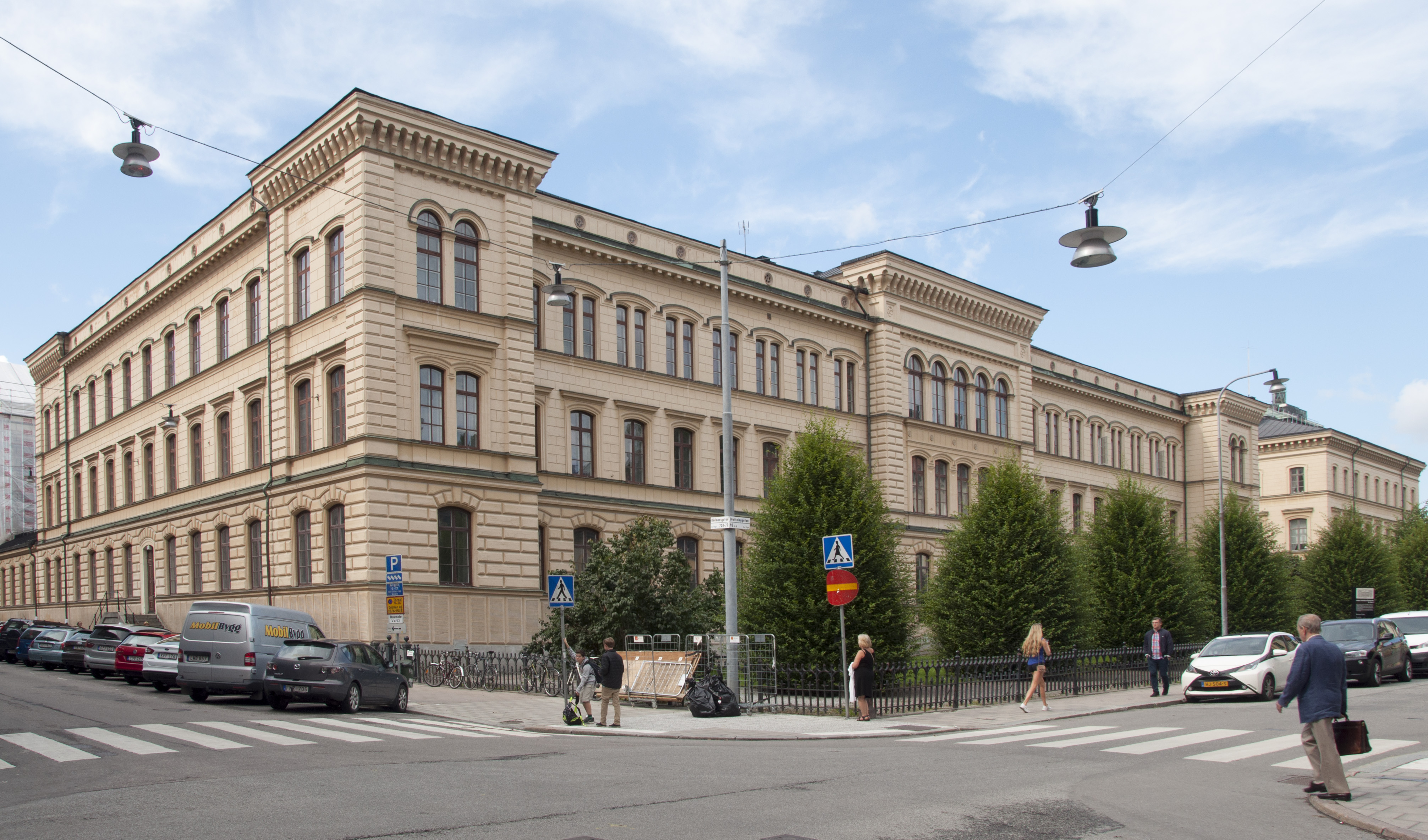 Gamla tekniska högskolan, Drottninggatan 95 i Stockholm. Nybyggnadsår 1860 - 1863. Arkitekt Fredrik Wilhelm Scholander.